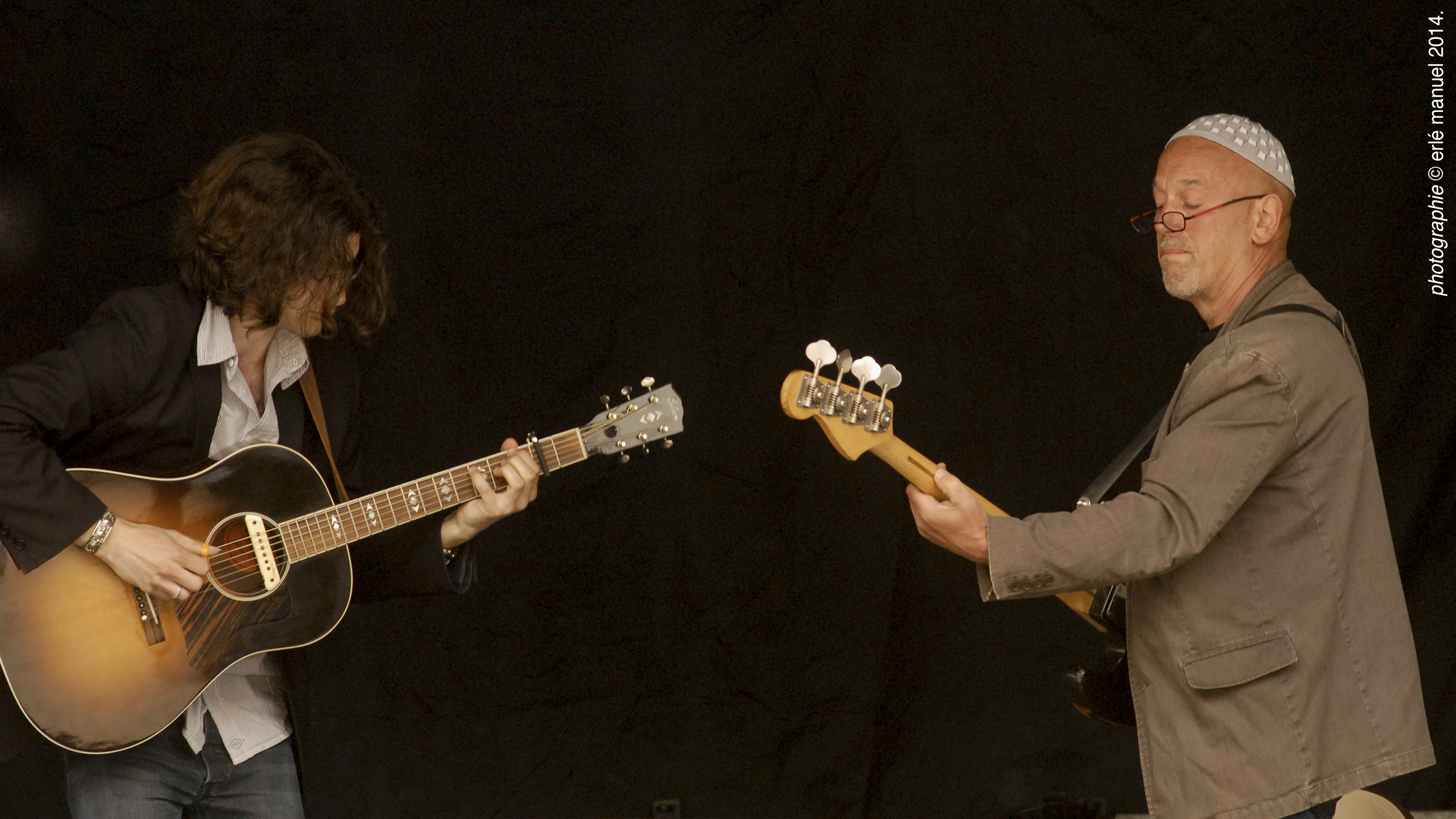 Arthur Manuel en concert, accompagné de Mars (Marcel Aubé) à la basse, en 2014.